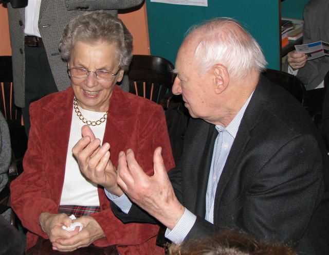 Anna Przedpełska-Trzeciakowska (b. July 5, 1927 in Warsaw, Poland) - Polish translator and Jacek Bocheński (b. July 29, 1926 in Lviv) - Polish writer.